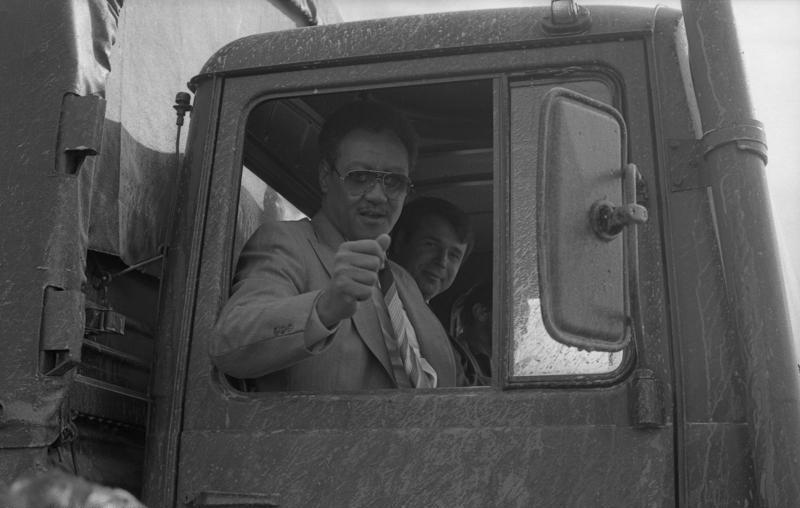 Staatsbesuch des Präsidenten der Demokratischen Republik Sudan, Gaafer Mohamed Numeiri, in der Bundesrepublik Deutschland. Besichtigung des Versuchsgelände der Magirus Deutz AG in Markbronn